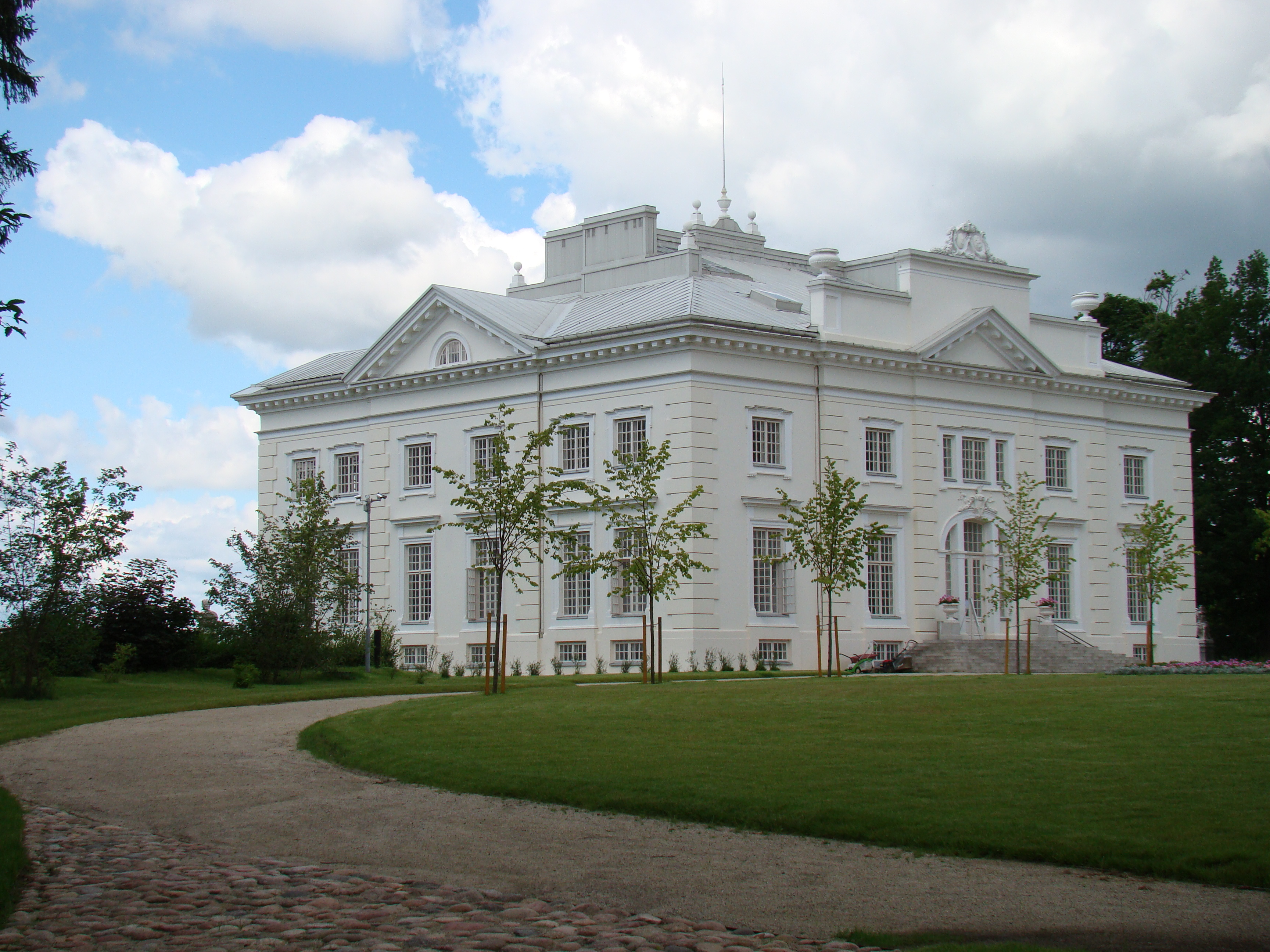 Užutrakio dvaro rūmai